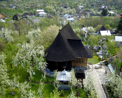 Rădăşeni, Suceava